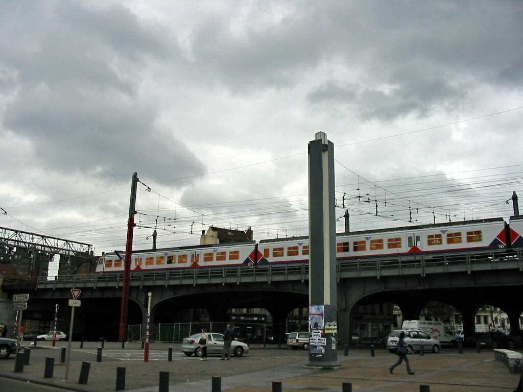 Gare du Midi à Bruxelles, entrée rue de France Photo JH Mora, mai 2006.